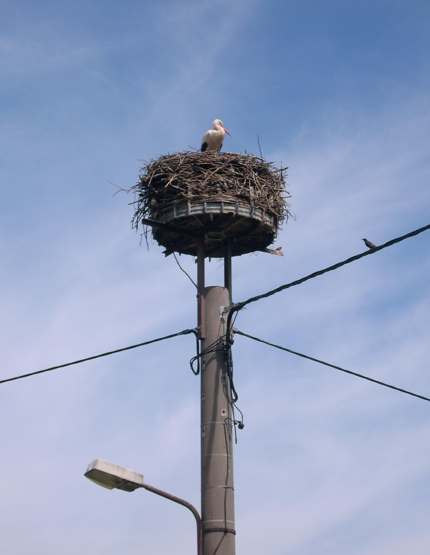 Storchennest am Storchenweg in Truppen, Ortsteil von Königswartha Hornjoserbsce: Baćonjace hnězdo w Trupinje pola Rakec